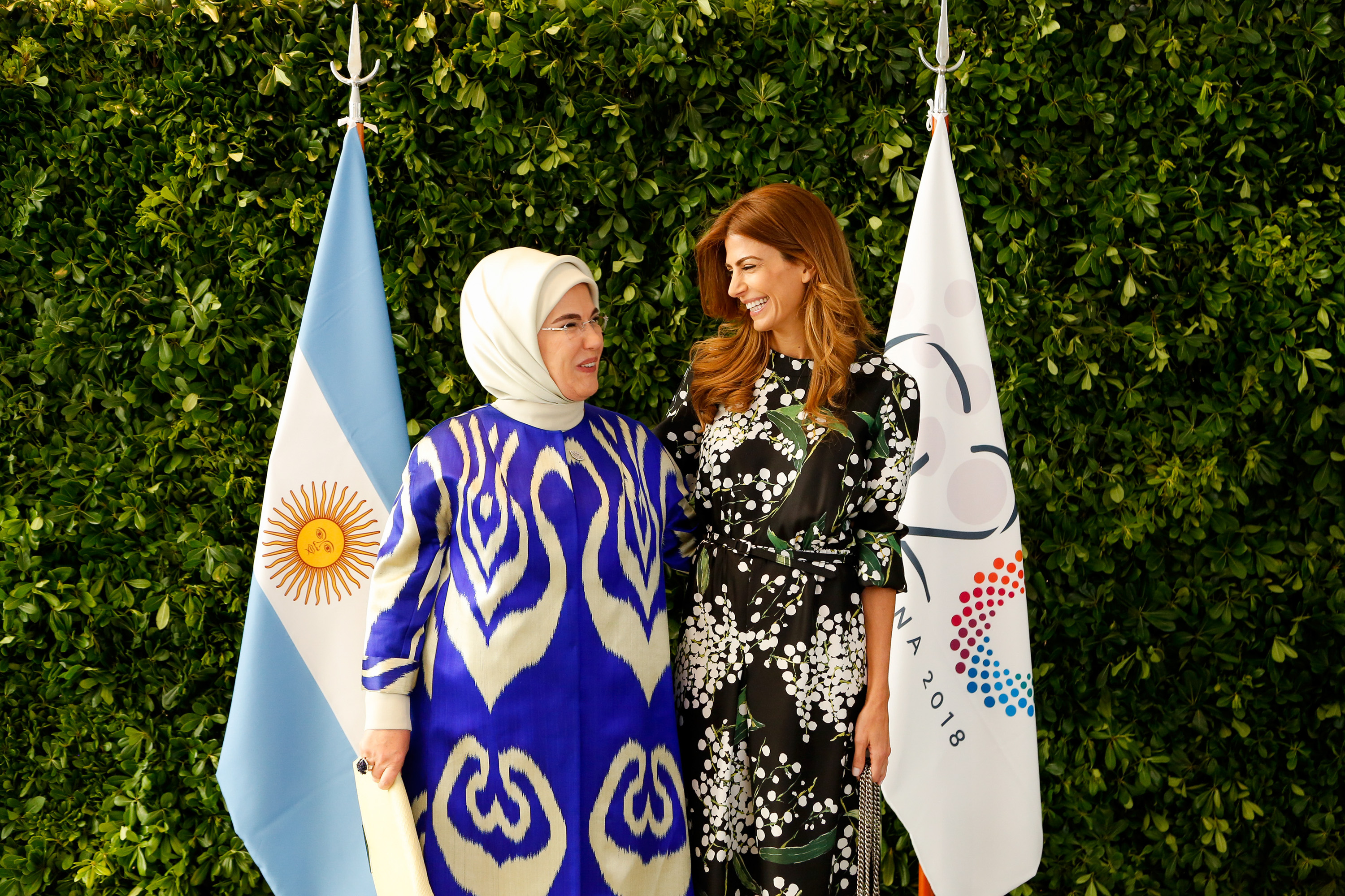 Partners Programme - Day 2